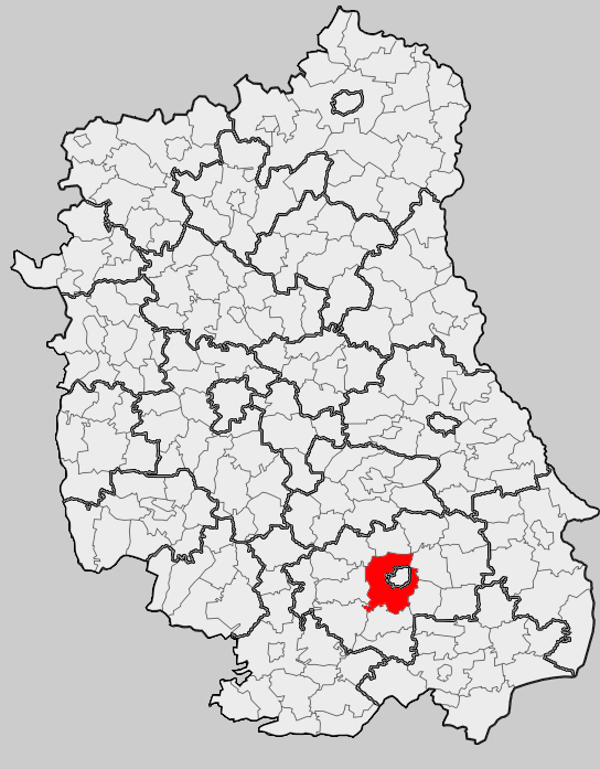 Map of gmina Zamość, Zamość county, Lublin voivodship Mapa gminy Zamość, powiat zamojski, województwo lubelskie